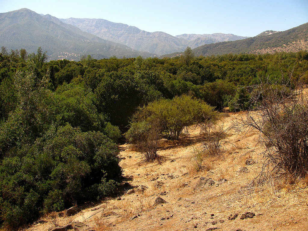 Bosque esclerófilo en la region metropolitana de Chile. Olor a Peumo, Corteza Quillay, miso al Litre y Lingue también hay.Borde de bosque Junto a sabana de Acacia caven. Feliz día Pacha !!canto siempre para ti ma. Pirque.